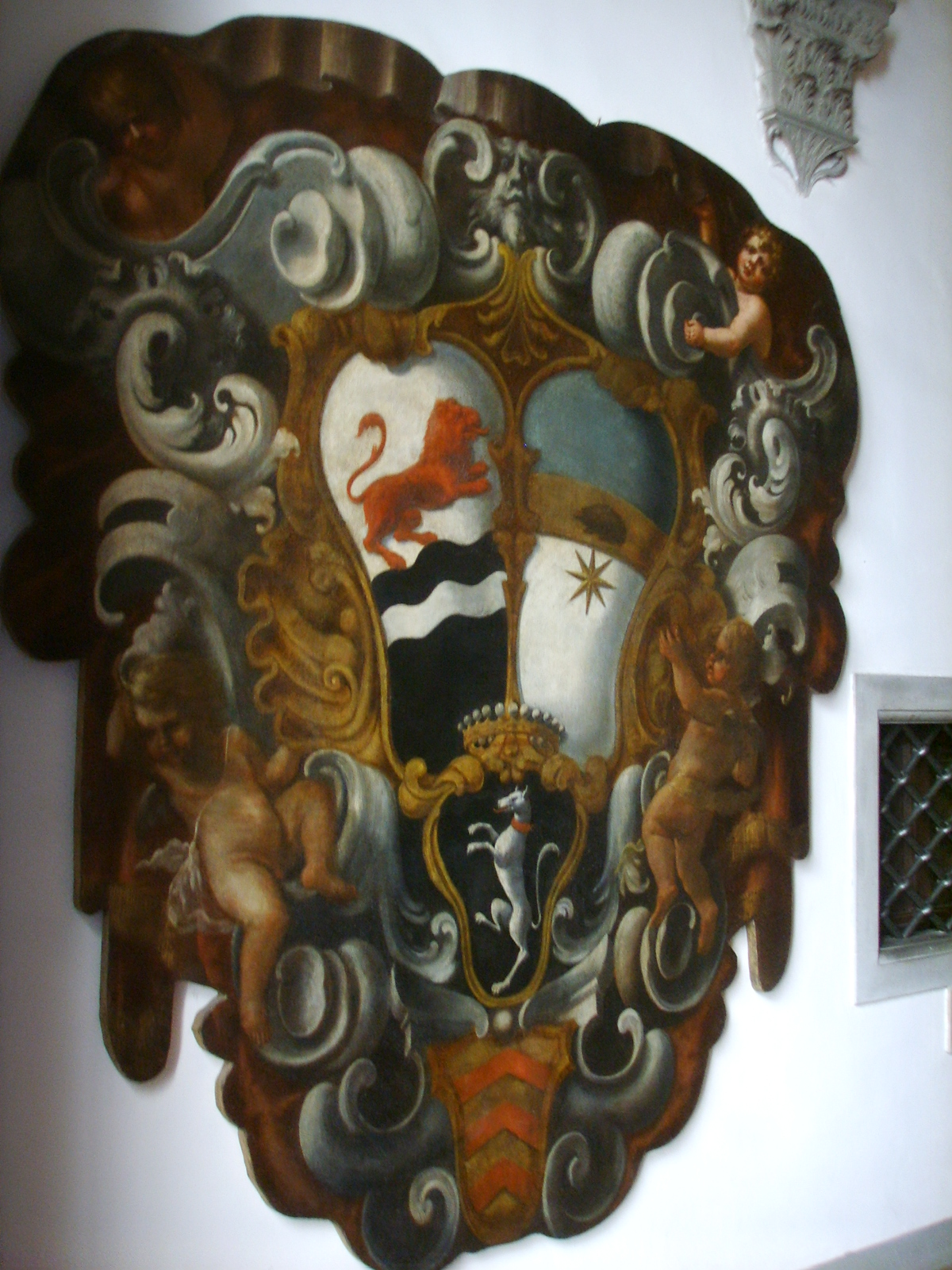 see fileneme